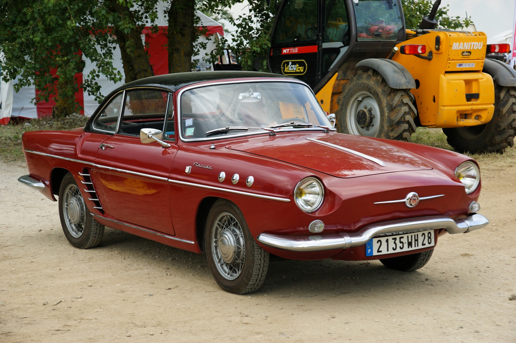 Une Floride vue à La Locomotion en Fête - 2009 La Floride est un cabriolet Renault disposant d'un moteur à l'arrière. C'est une dérivée de la Dauphine.